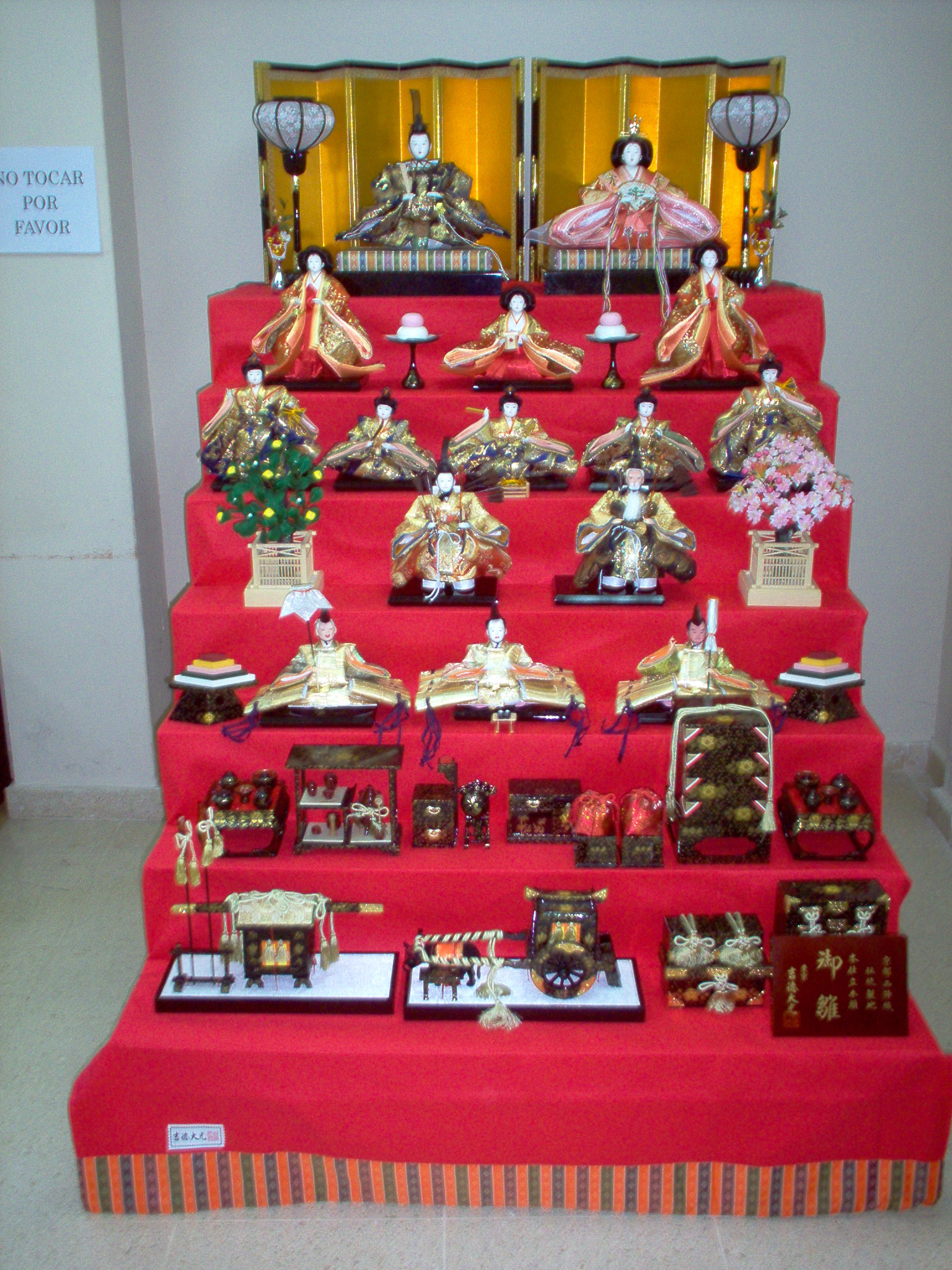 Juego de artesanía usado en el Hinamatsuri. La foto la tomé yo mismo en una feria japonesa en mi universidad.